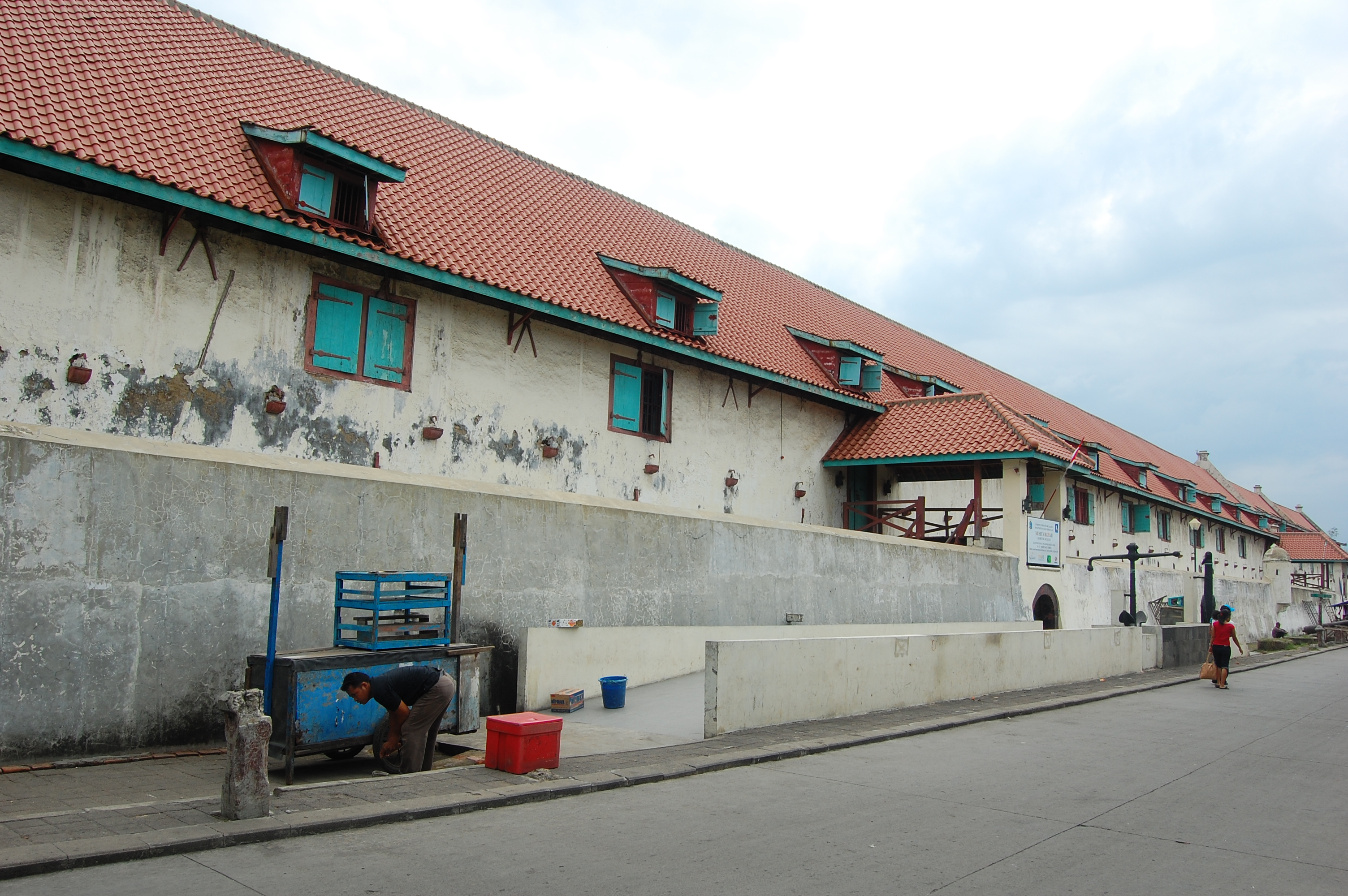 Museum Bahari adalah museum yang menyimpan koleksi yang berhubungan dengan kebaharian dan kenelayanan bangsa Indonesia dari Sabang hingga Merauke. Museum ini terletak di Jalan Pasar Ikan, Jakarta